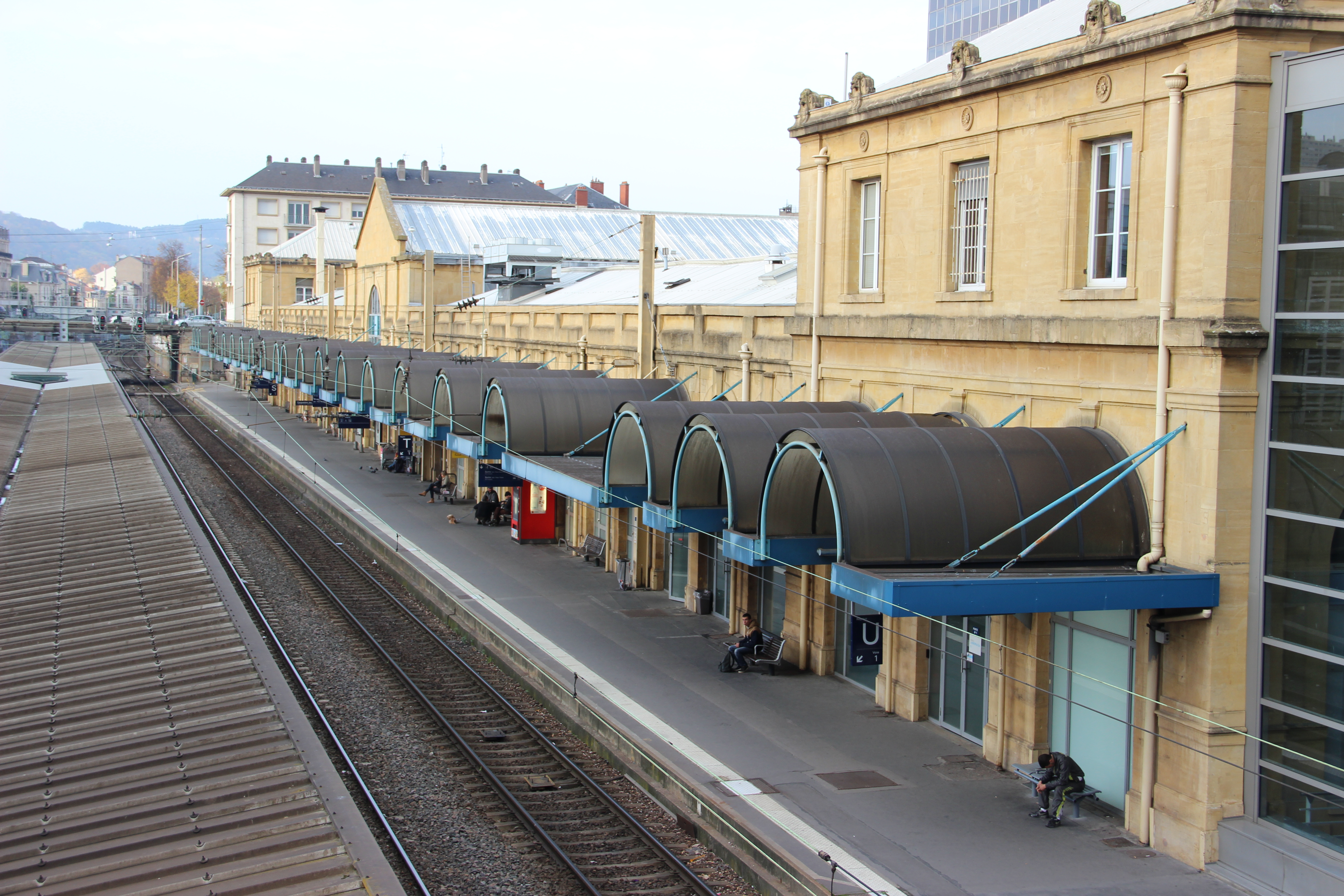 Vue générale des quais